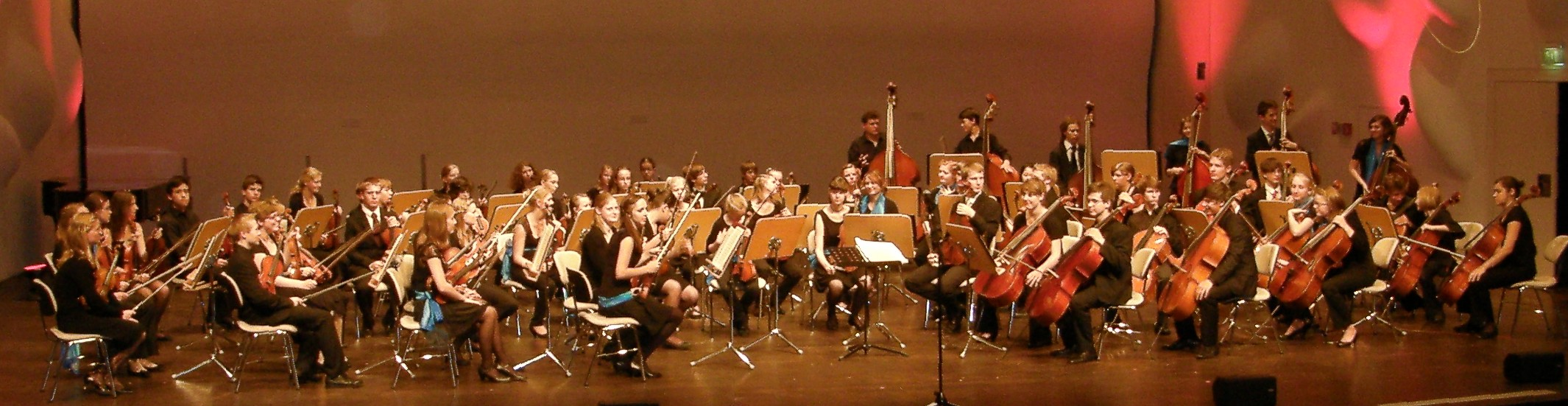 Potsdam, Nikolaisaal, Konzert der Dt. Streicherphilharmonie